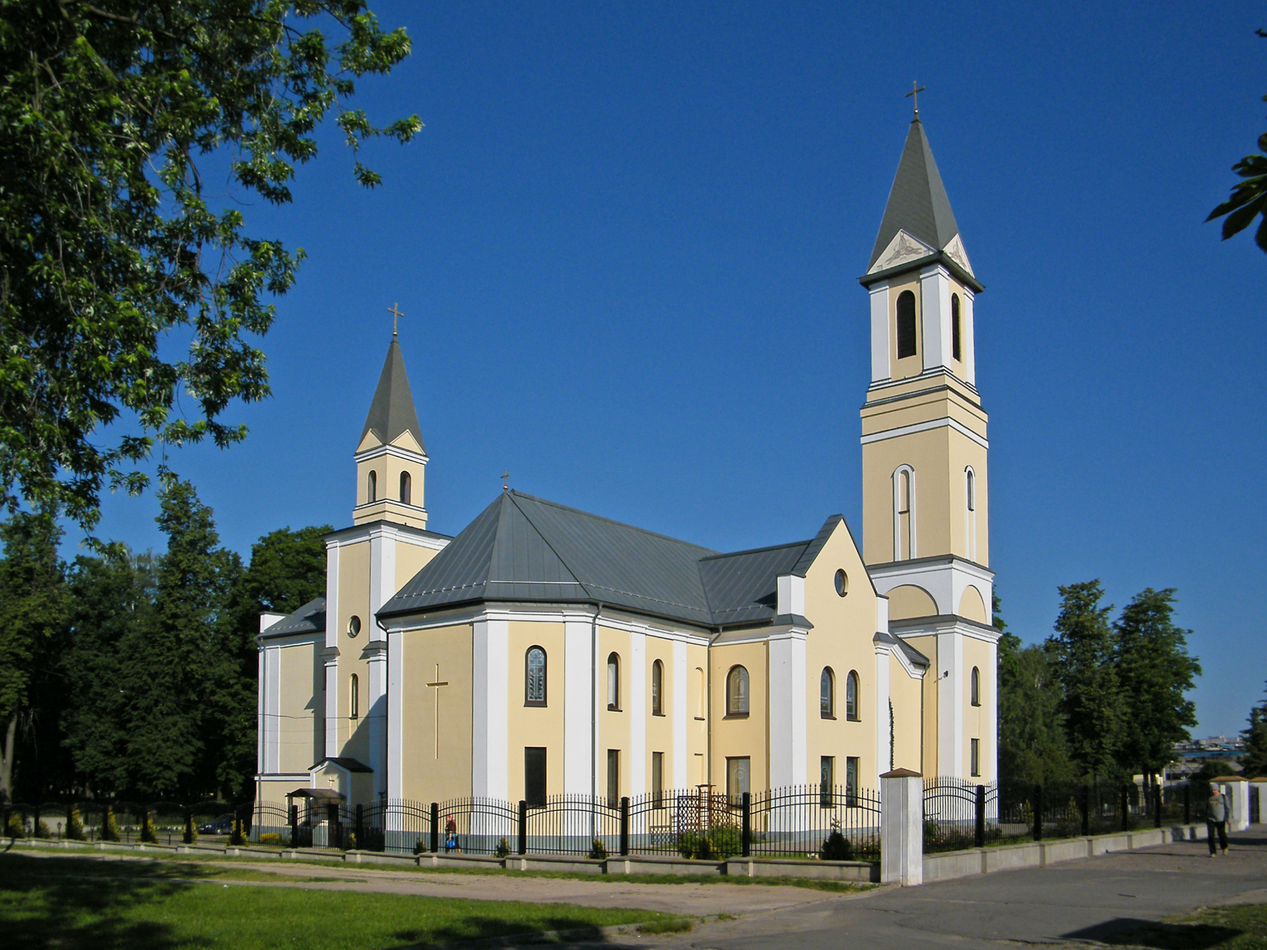 Католический костел Рождества Богоматери